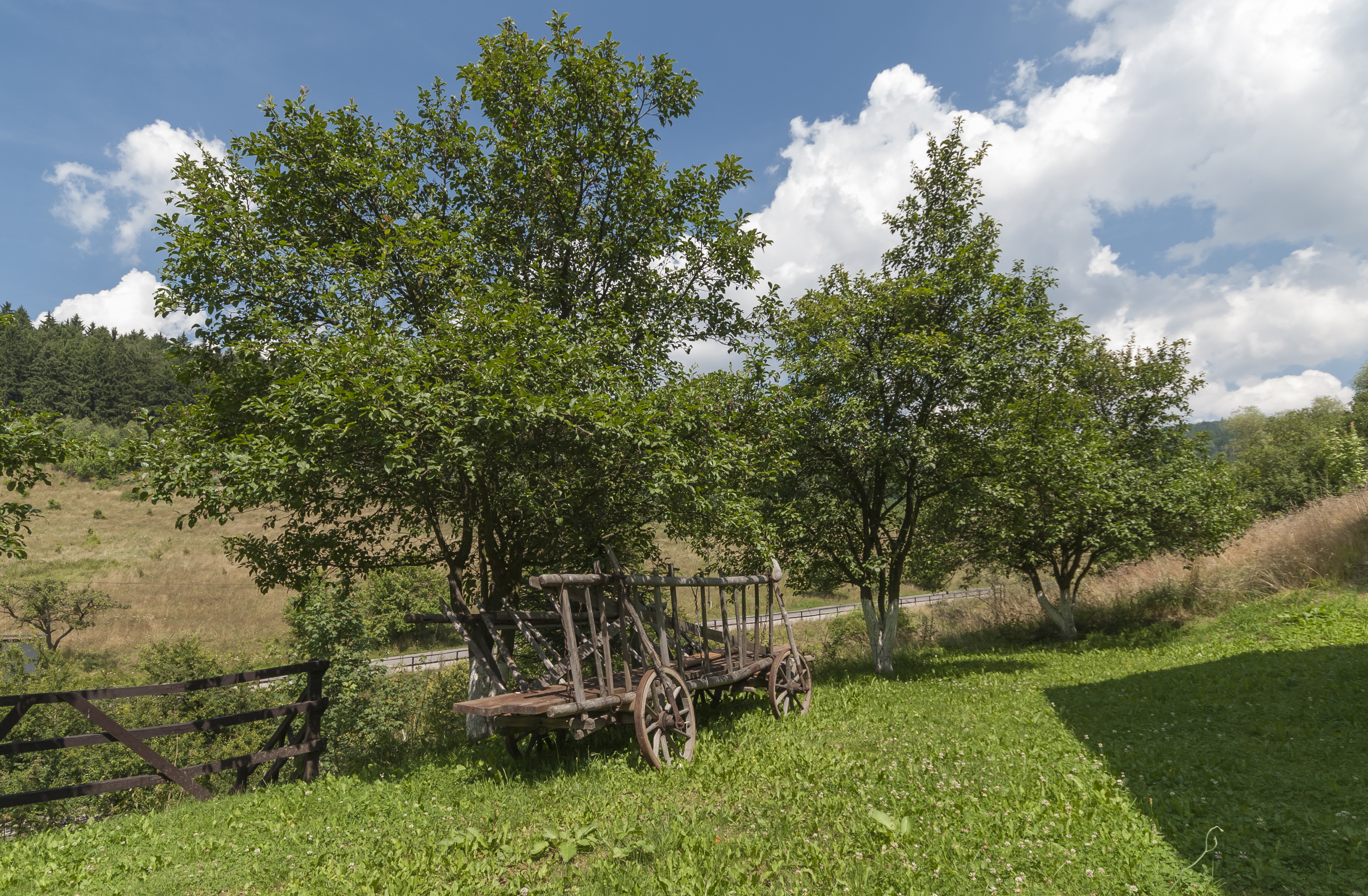 Kudowa-Zdrój - Pstrążna, wóz drabiniasty w Muzeum Kultury Ludowej Pogórza Sudeckiego